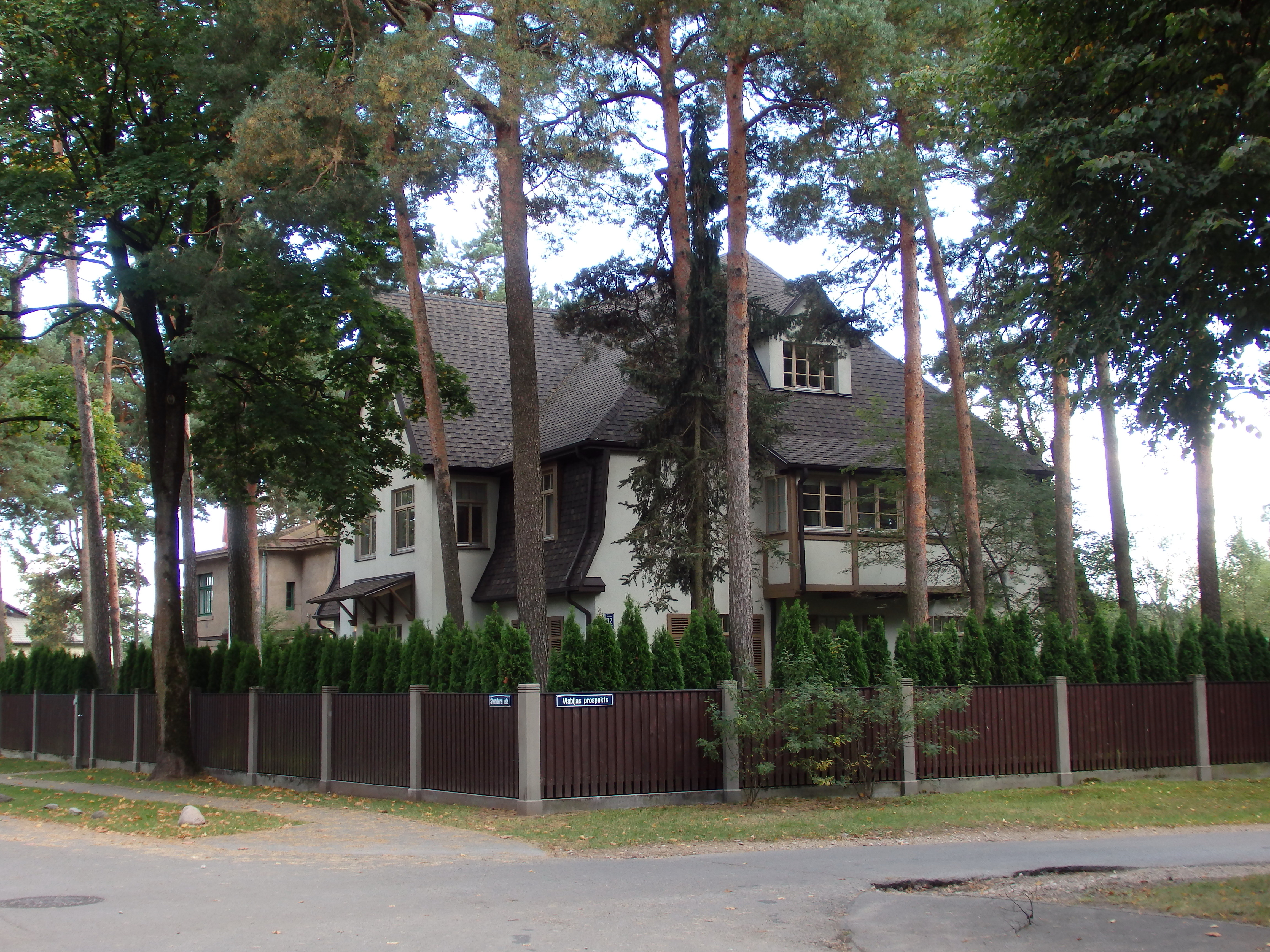 Savrupmāja, Rīga, Visbijas prospekts 32